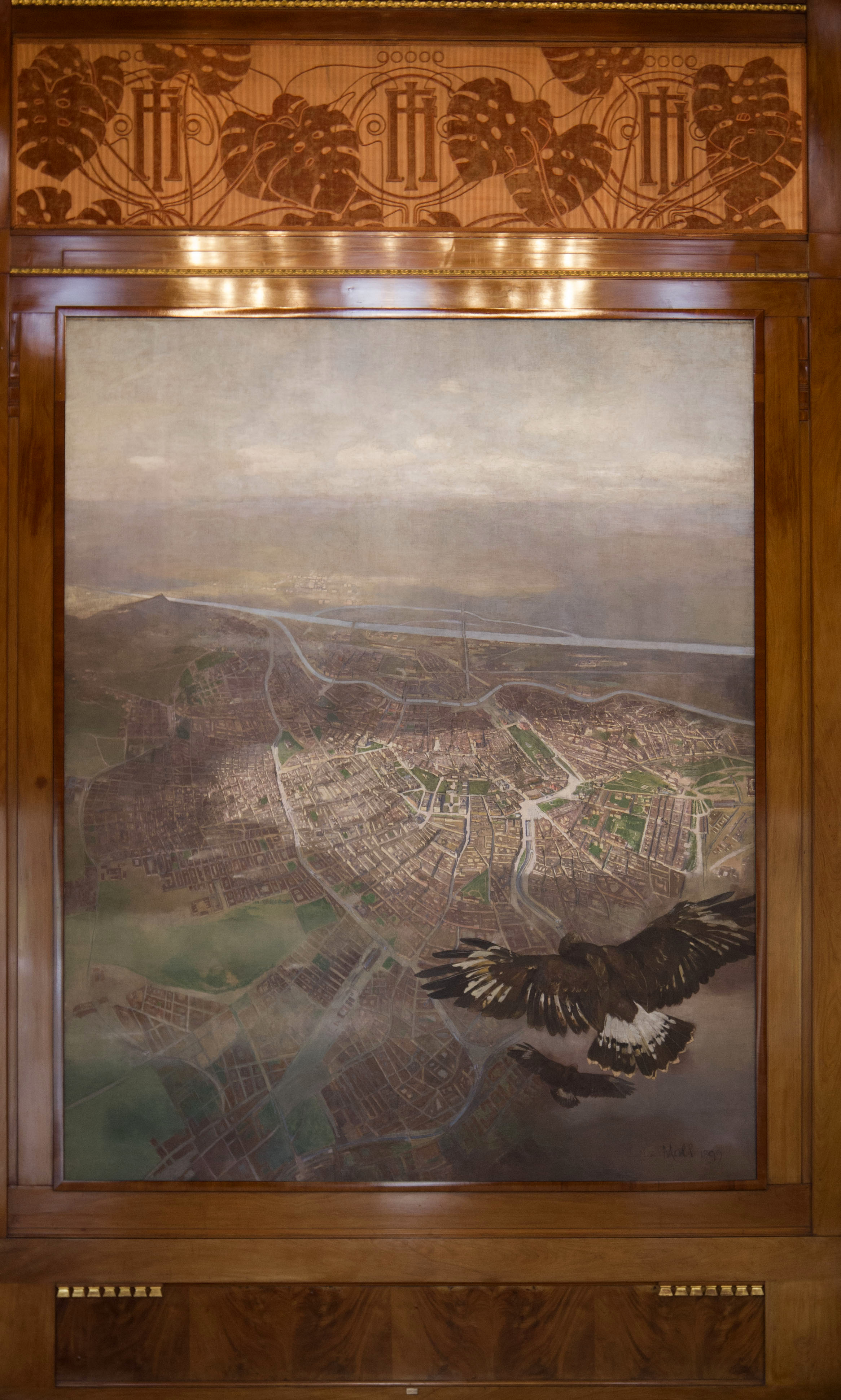 Otto Wagner Hofpavillon Hietzing Dieses Bild wurde anlässlich des österreichischen Tags des Denkmals 2014 in Wien eingereicht.